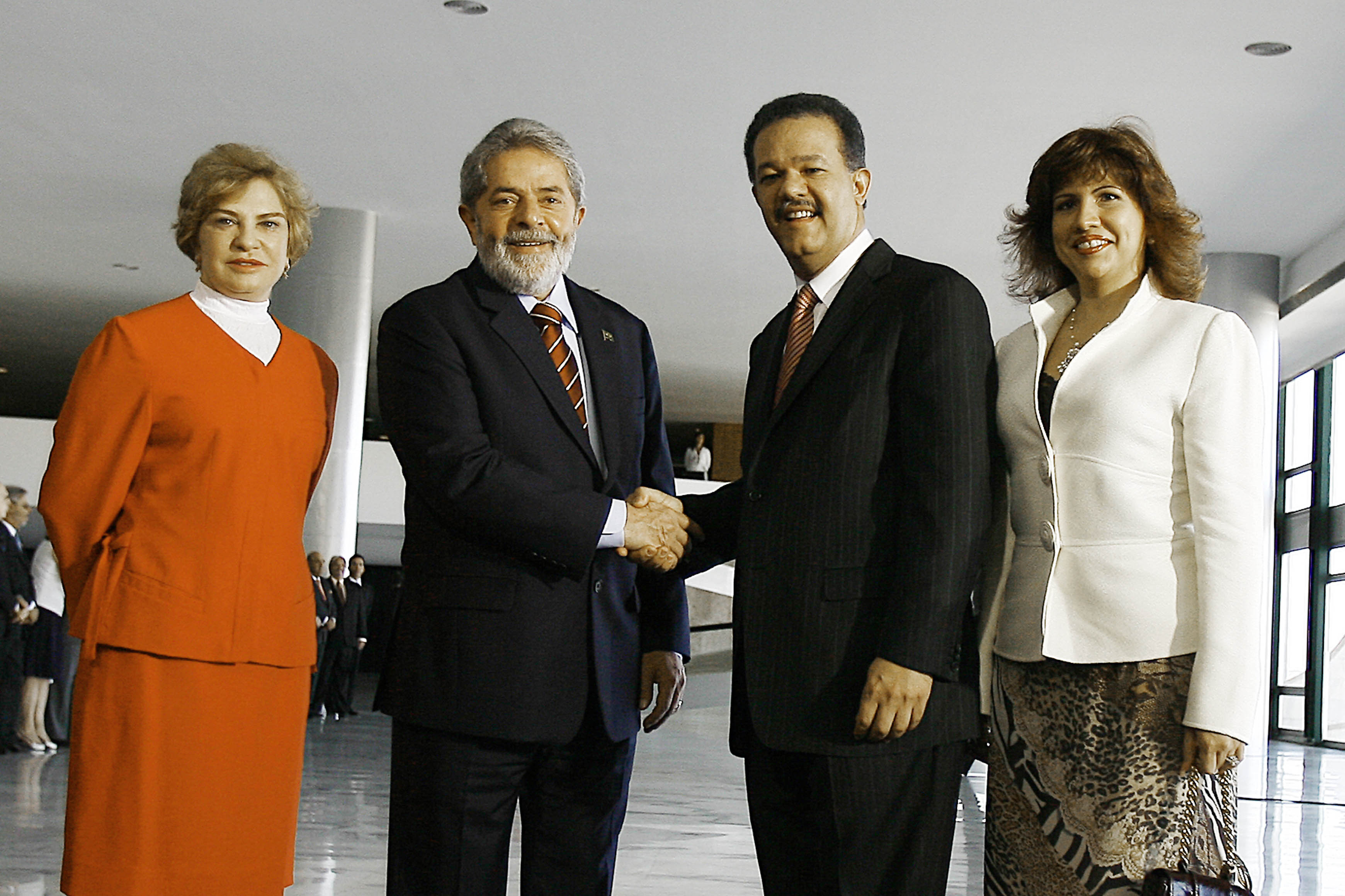 Brasília - A primeira-dama Marisa Letícia, o presidente Luiz Inácio Lula da Silva, o presidente da República Dominicana, Leonel Fernandez Reyna, e sua mulher, durante encontro no Palácio do Planalto Foto: Ricardo Stuckert/PR